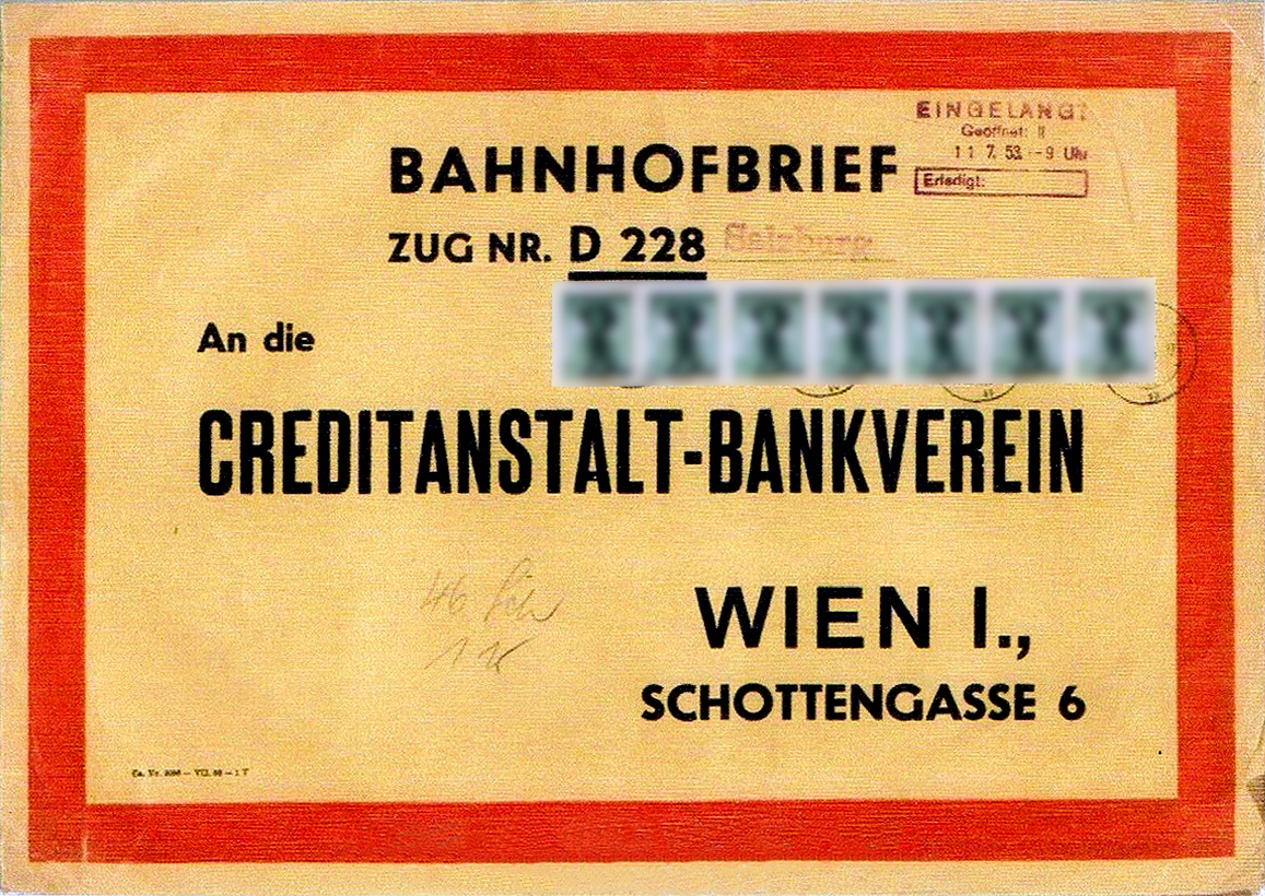 Bahnhofbrief (spezielle Art der Postbeförderung) aus Salzburg mit dem Schnellzug D 228 nach Wien an die Creditanstalt-Bankverein am 10. Juli 1953. Beleg für die Schreibweise ohne Fugen-s in Österreich